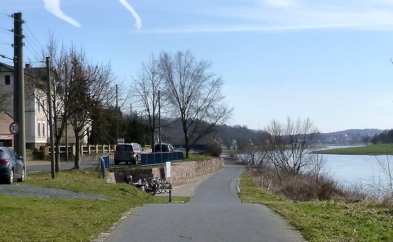 Elberadweg 2017 in Karpfenschänke